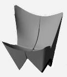 bkf2000, en una plaza de Buenos Aires, iluminado para que solo se vea el mueble.